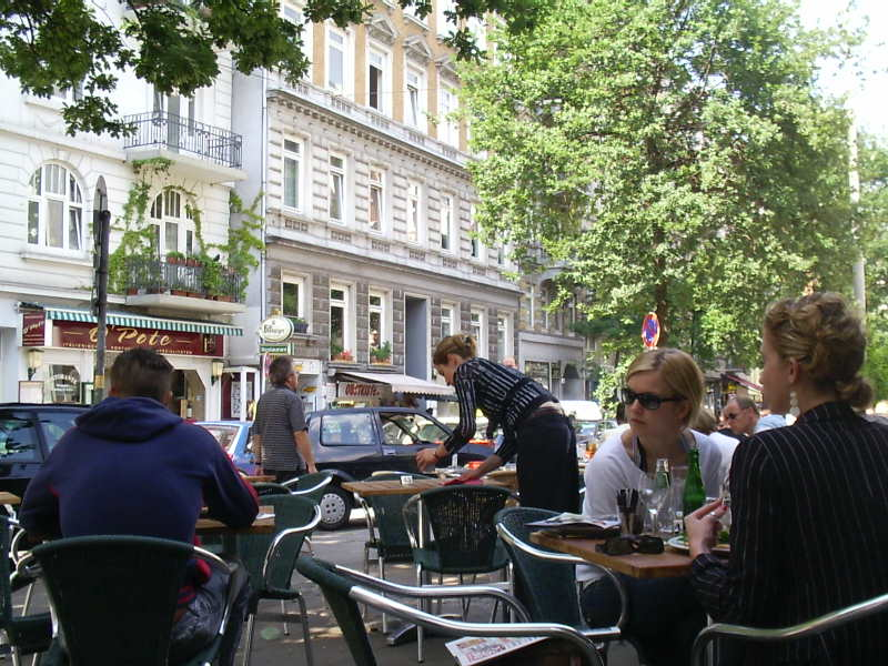 Straßencafé in der Langen Reihe in Sankt Georg.